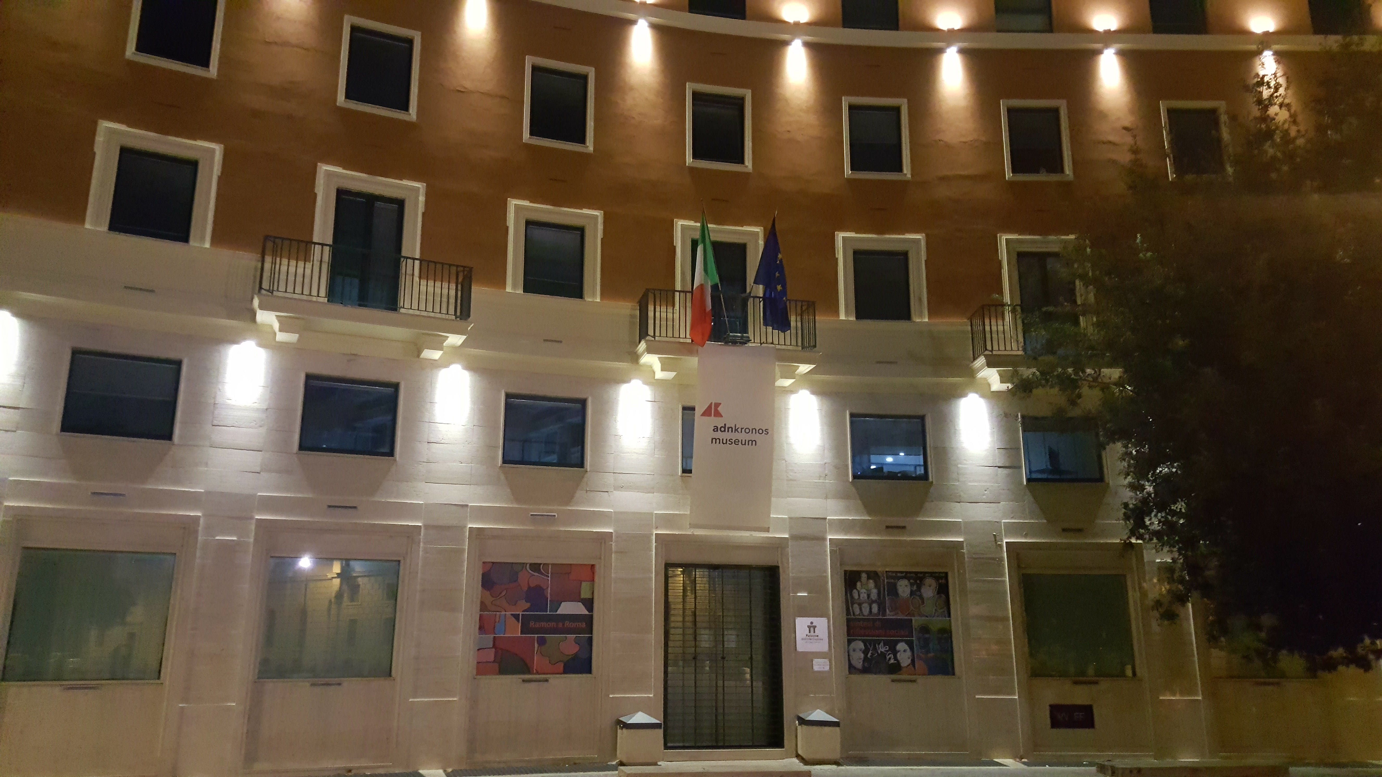 Sede AdnKronos a Roma, Piazza Mastai